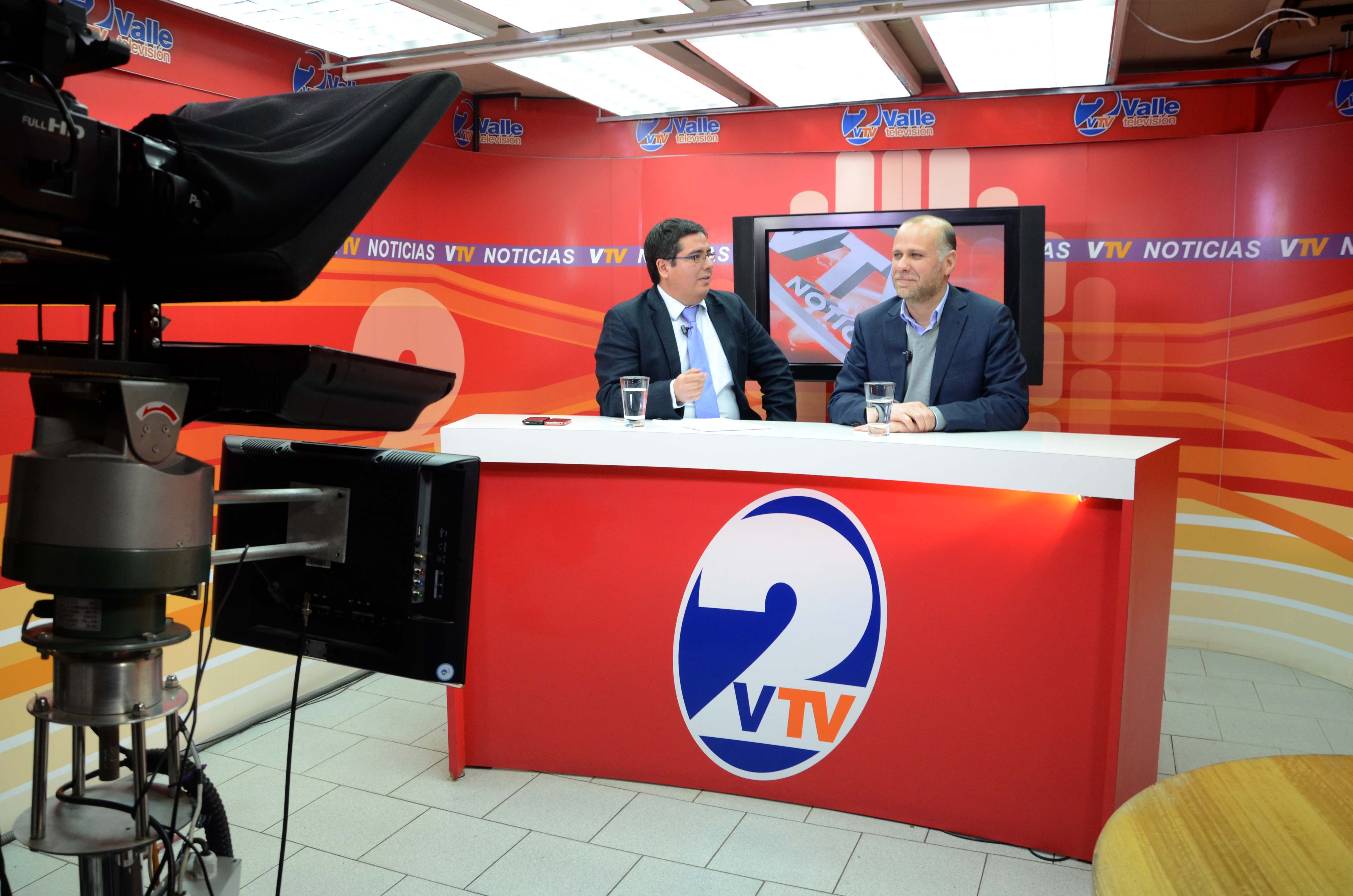 V TV televisón entrevistó al Ministro Elizalde